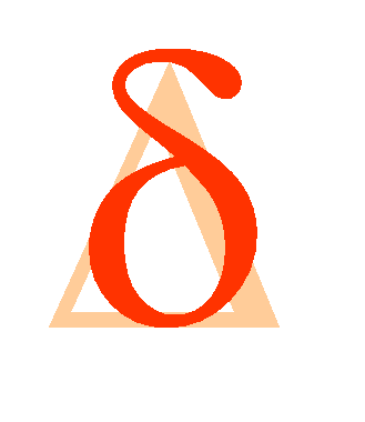 Greek letter